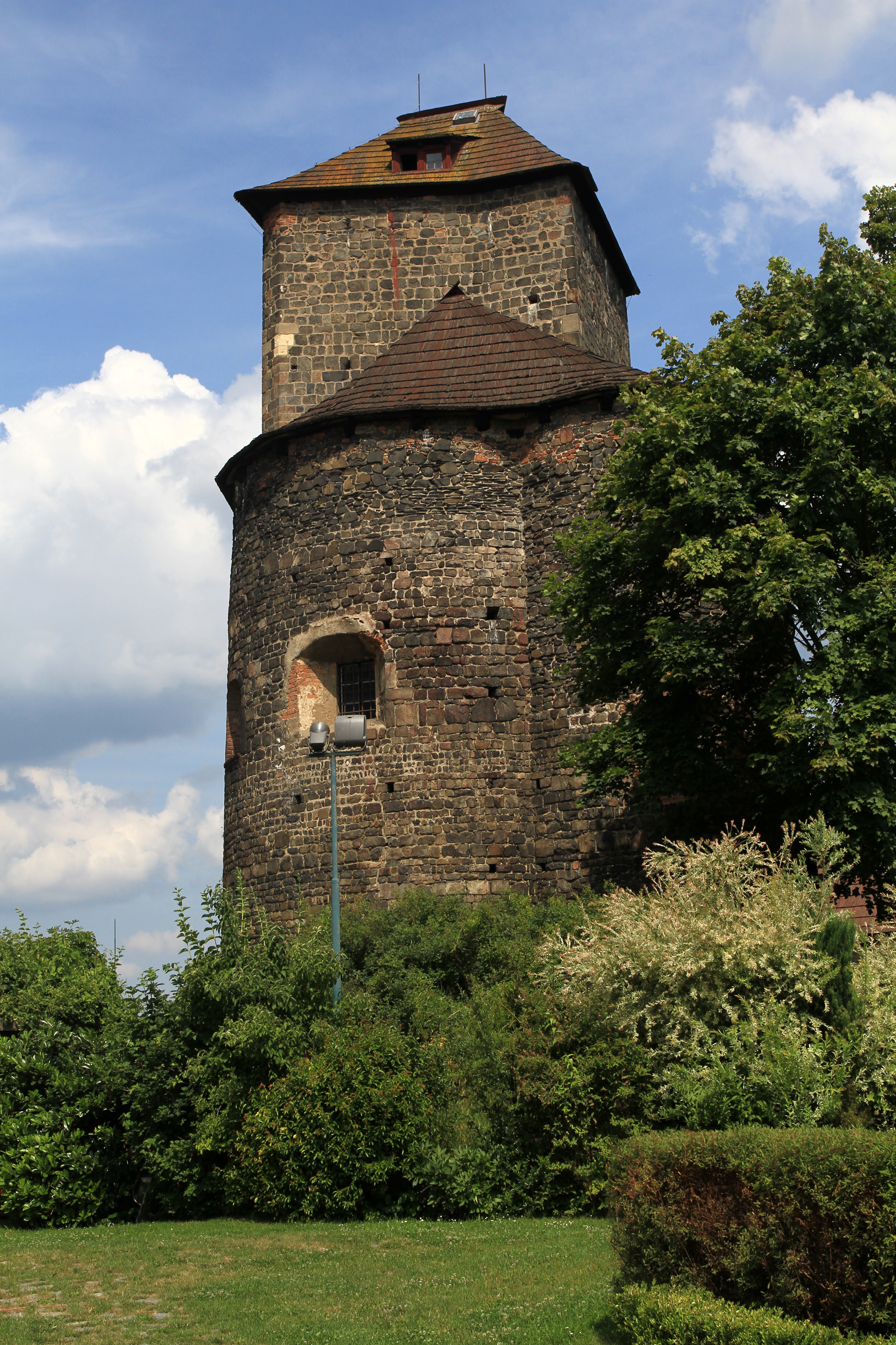 Hrad s rotundou, část stojící a archeologické stopy (Týnec nad Sázavou), Nádvoří Hodějovského, Týnec nad Sázavou